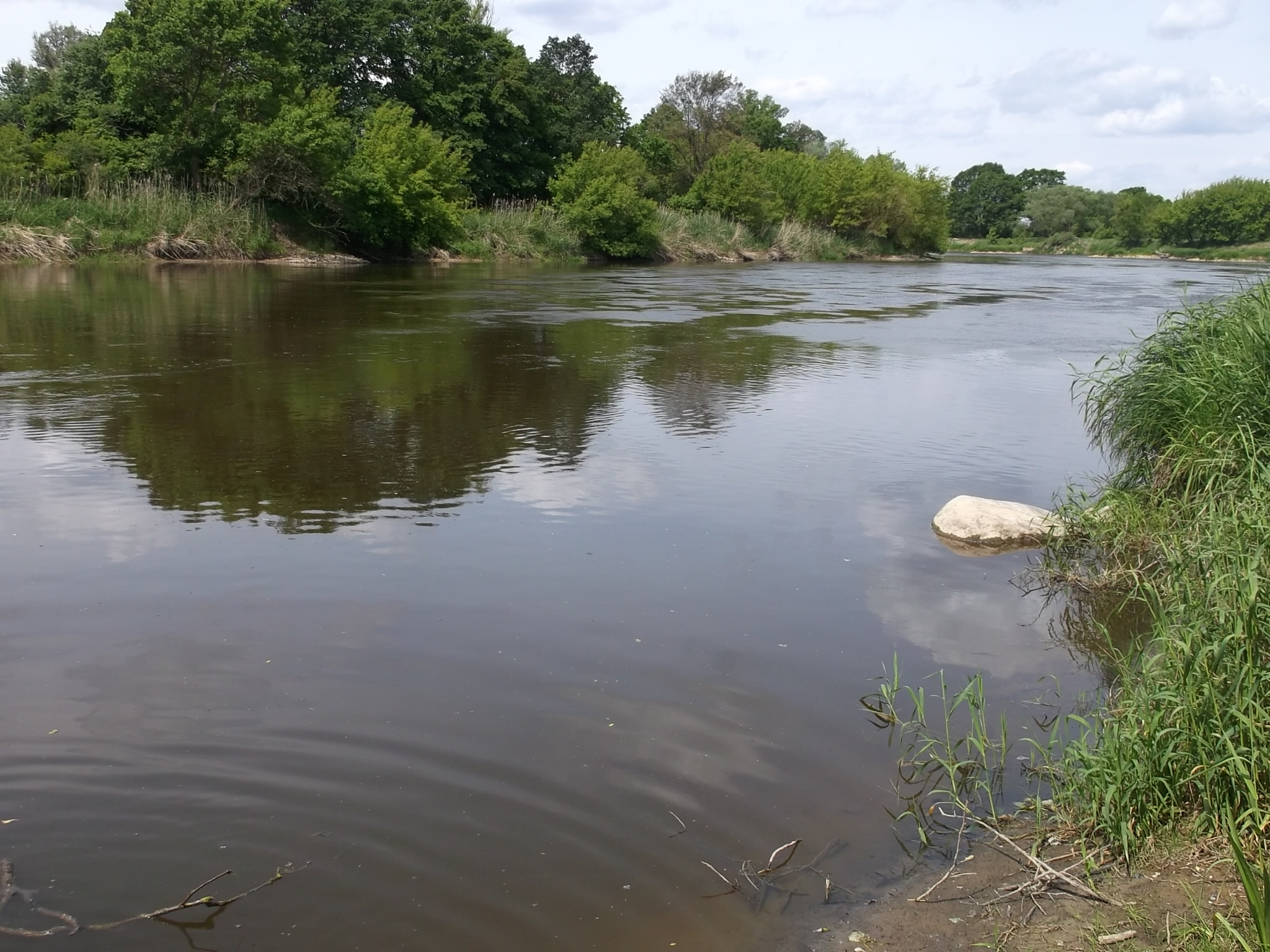 Warta w okolicach Międzychodu